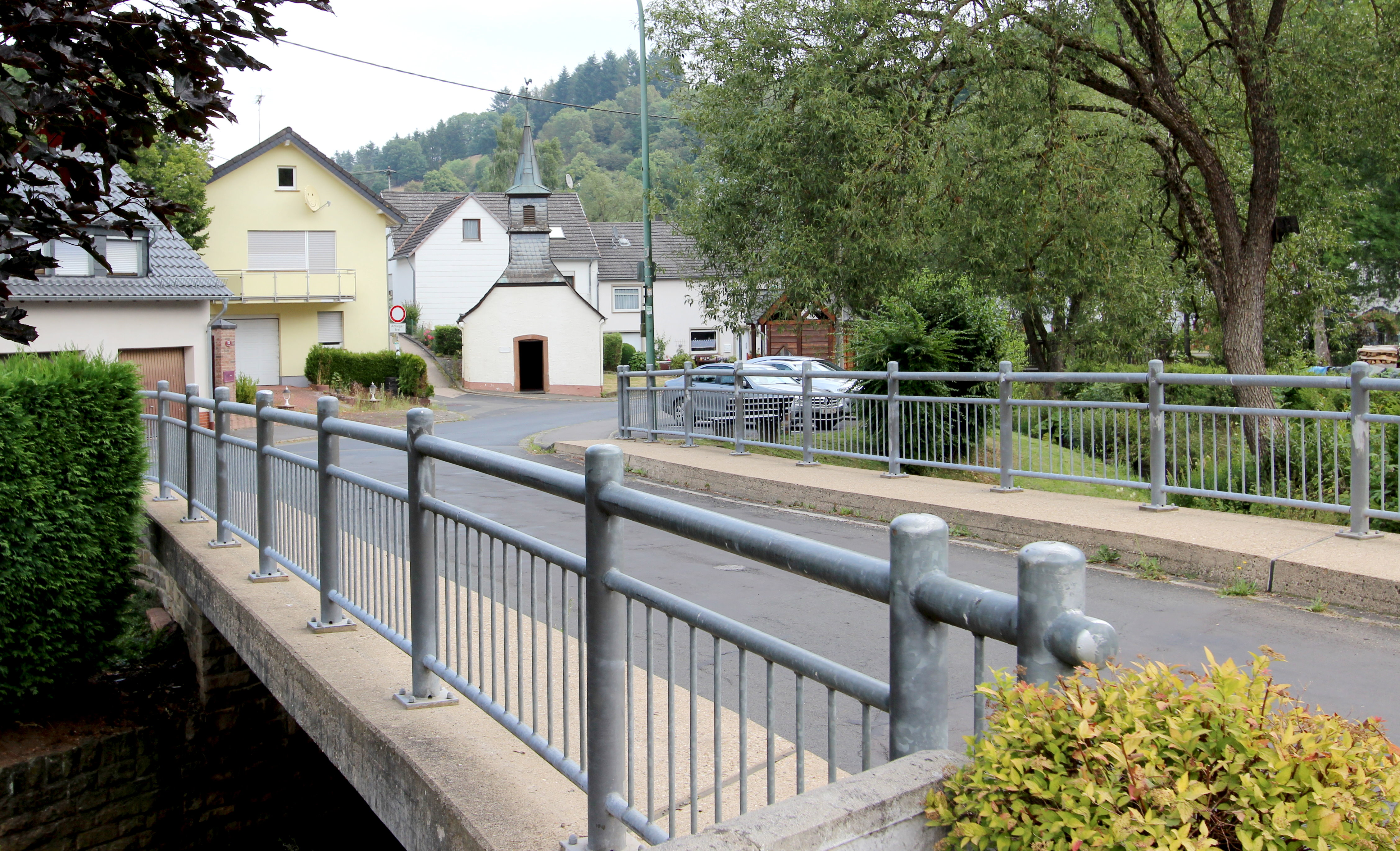 Katholische Filialkirche St. Donatus, 54550 Gemünden, Lieserstraße. Zweiachsiger Saalbau, bezeichnet 1731. Aufnahme von 2019.